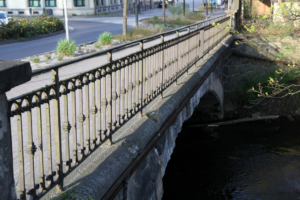 Hospitalbrücke Radeberg, schmiedeeisernes Geländer